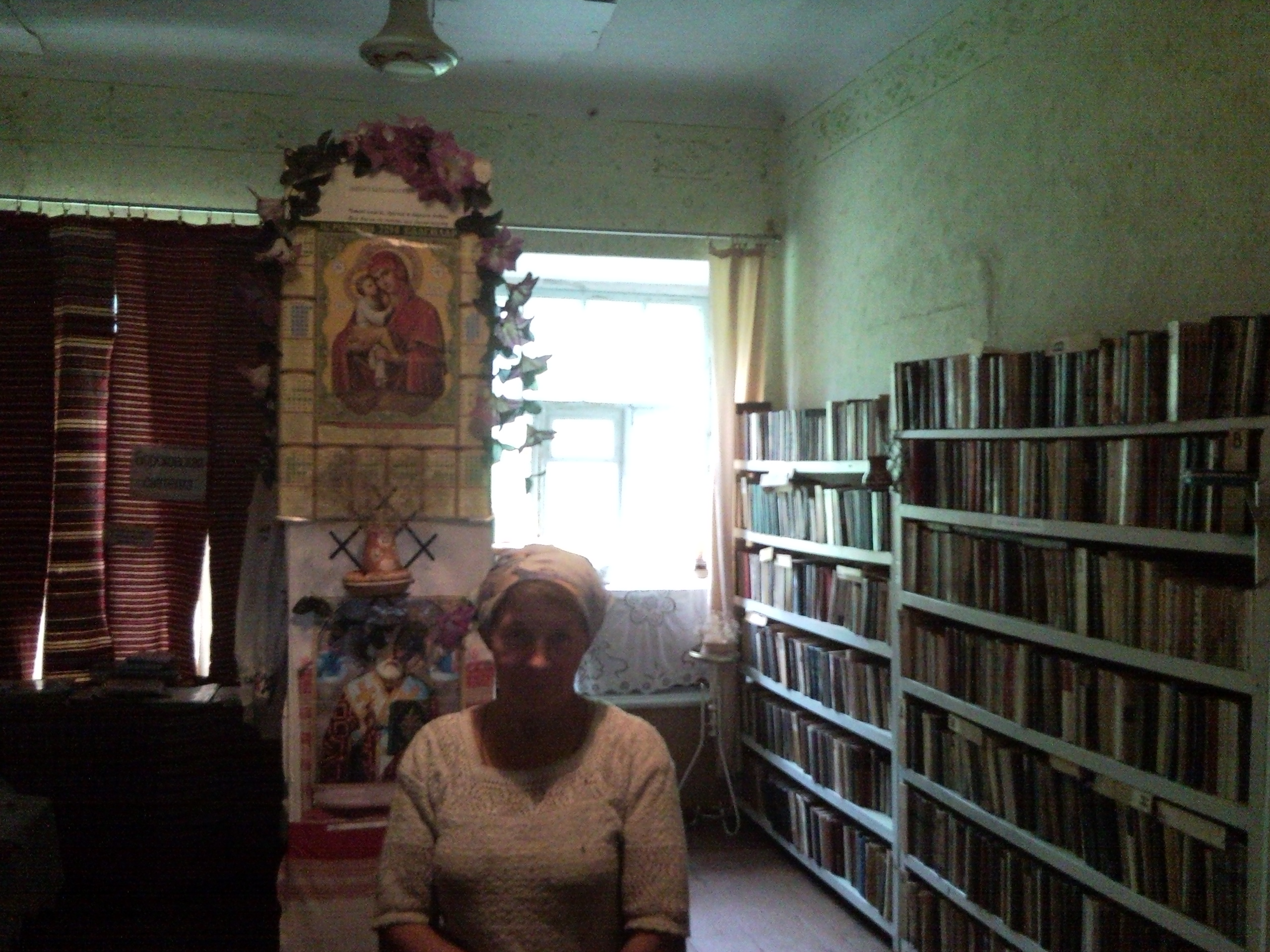 Борсків. Бібліотека